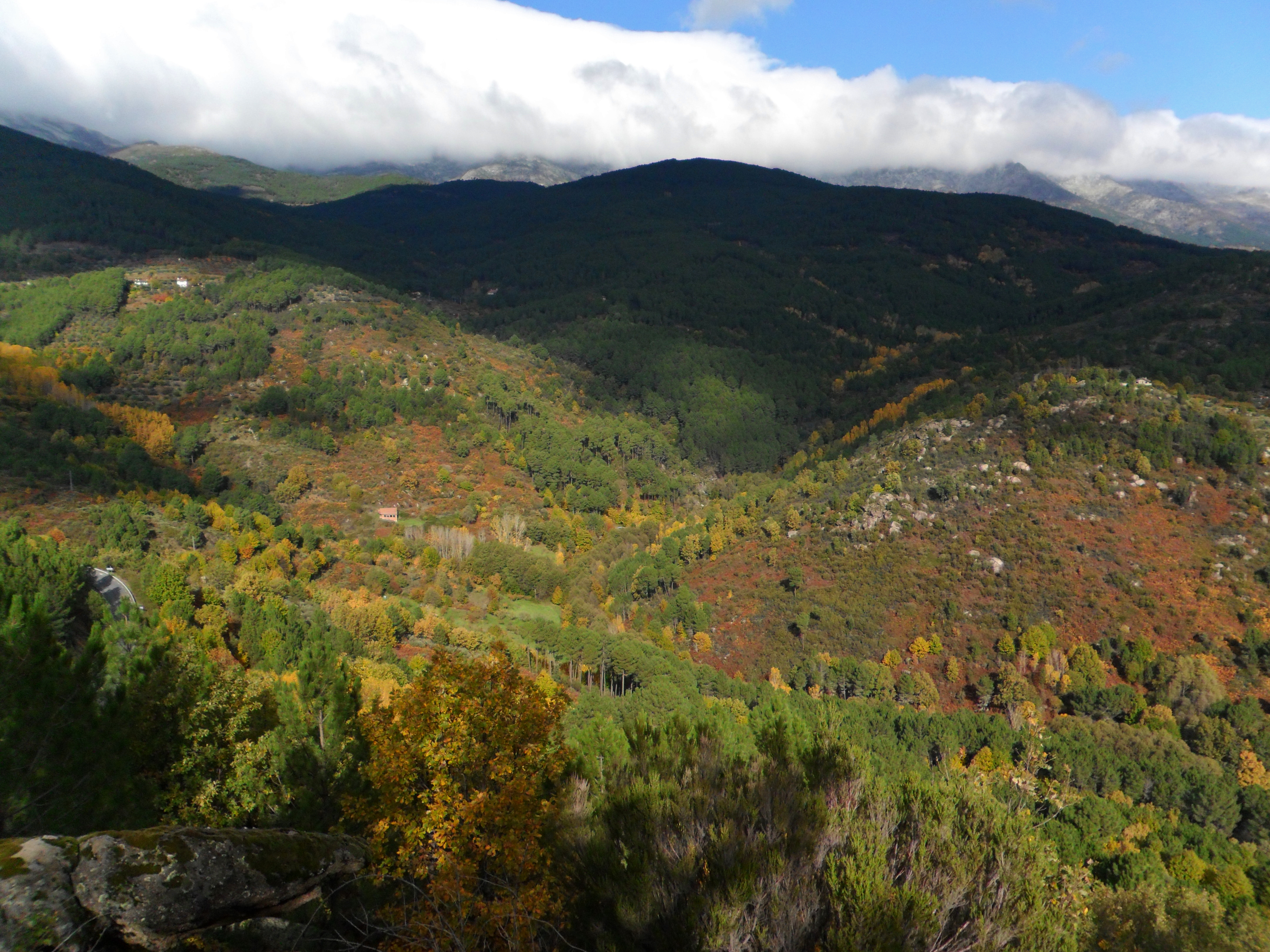 Bosques en la sierra de Gredos, Arenas de San Pedro.